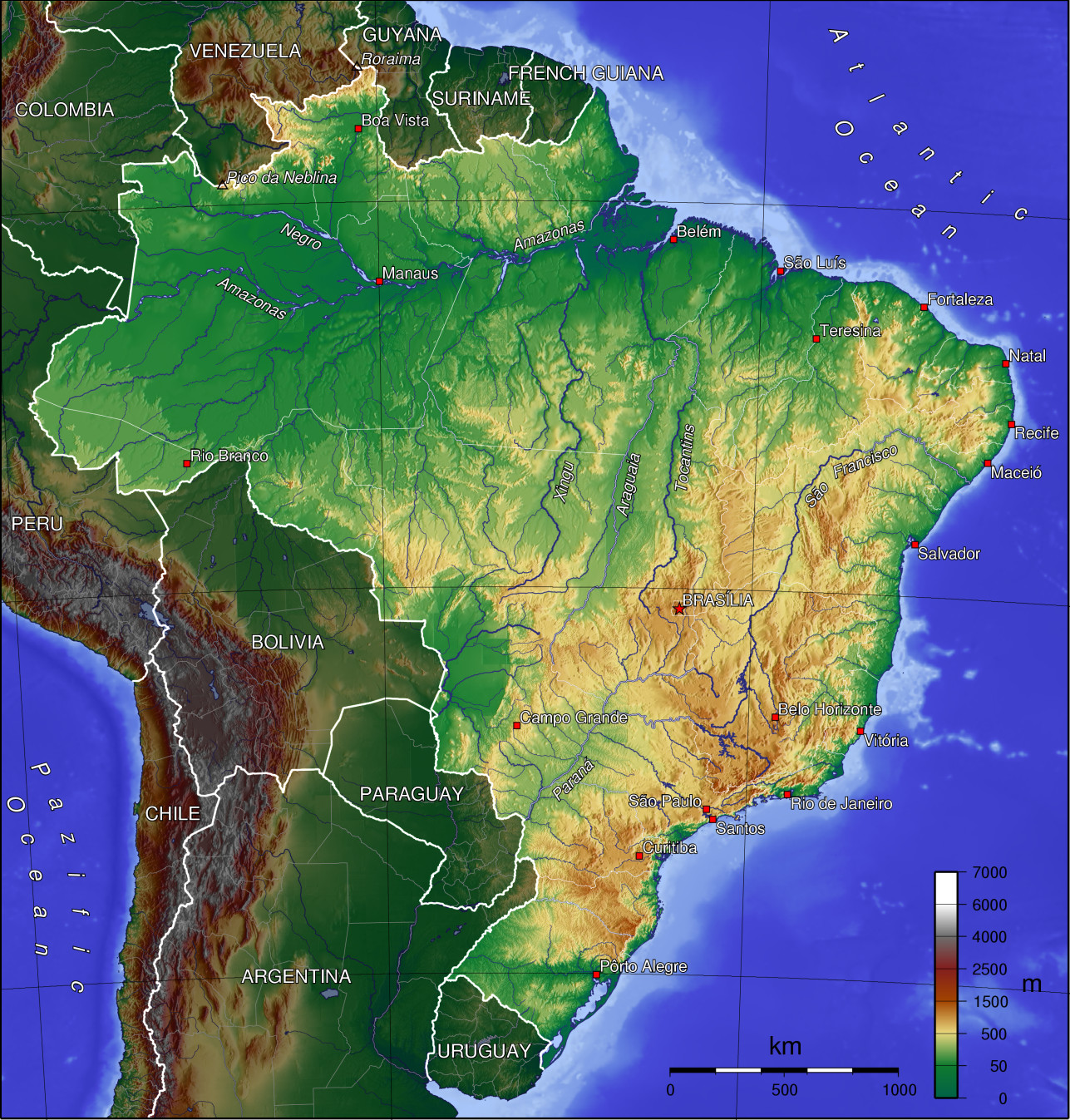 Topografia do Brasil.